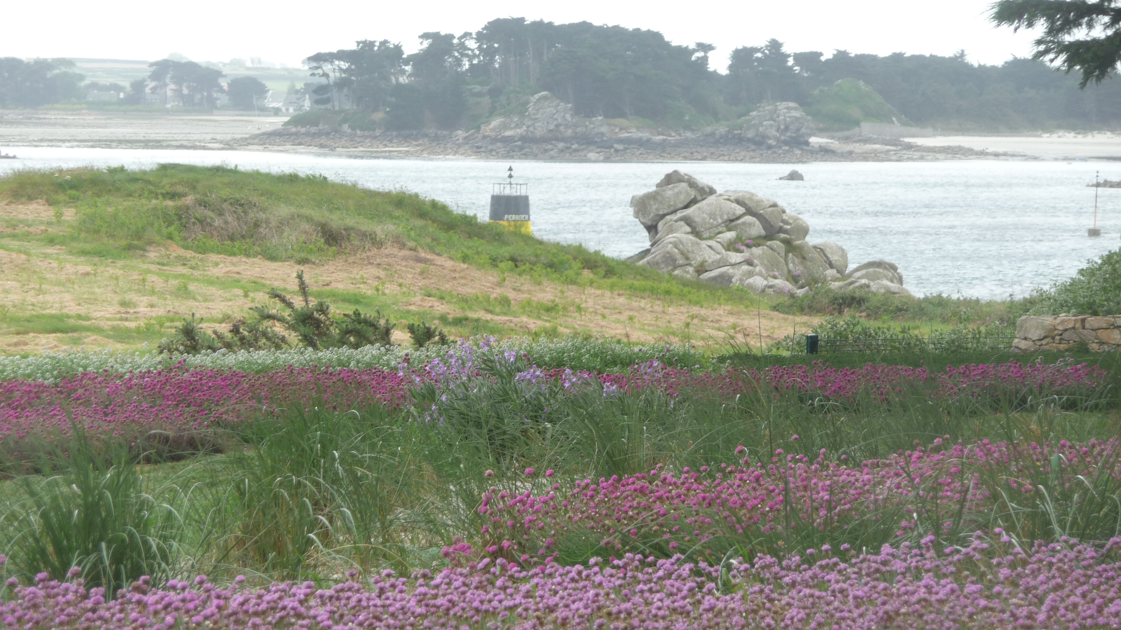 Île de Batz : jardin Geoges Delaselle, fleurs et vue sur Roscoff